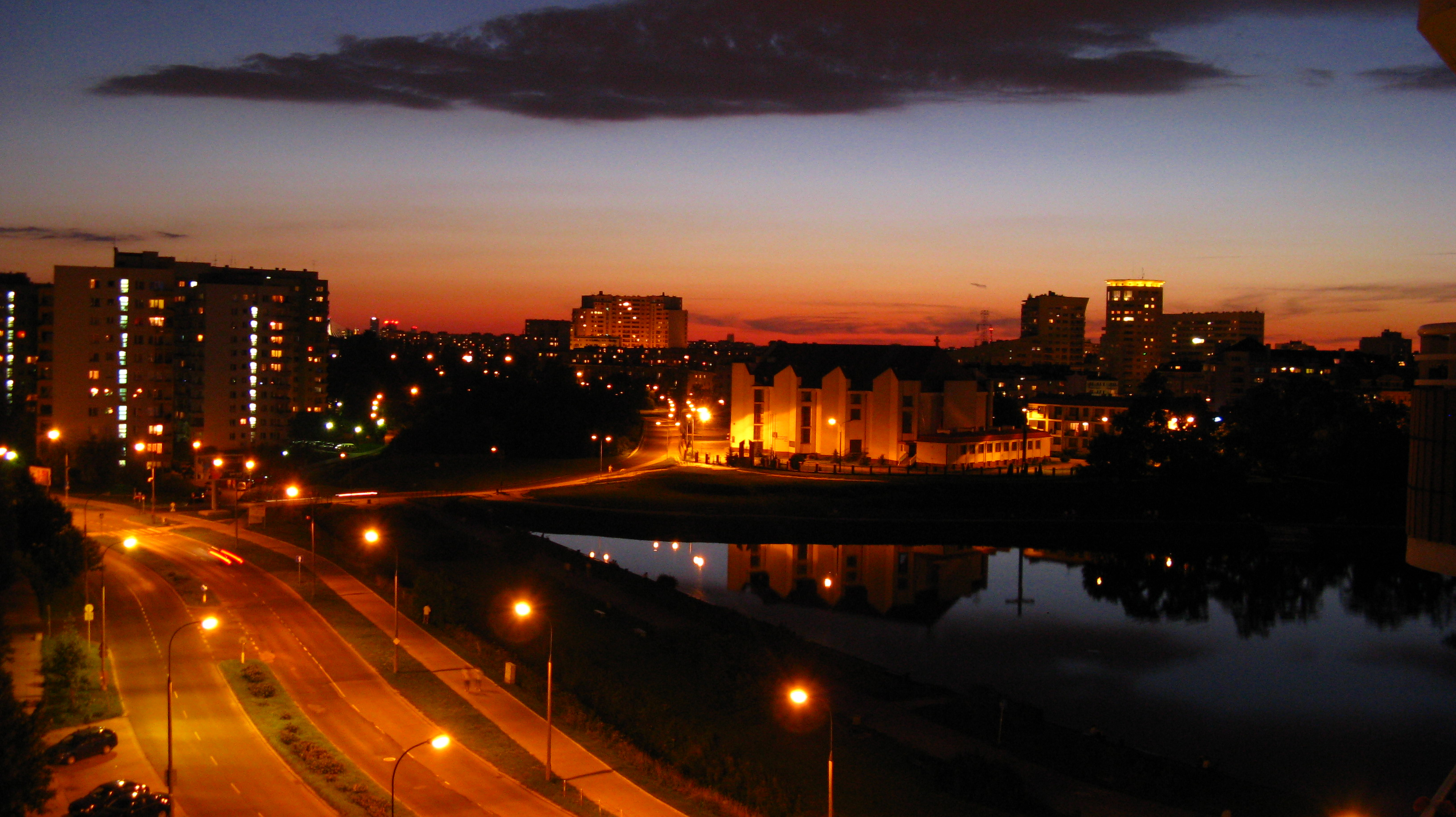 Warszawa (Gocław) - balaton nocą.